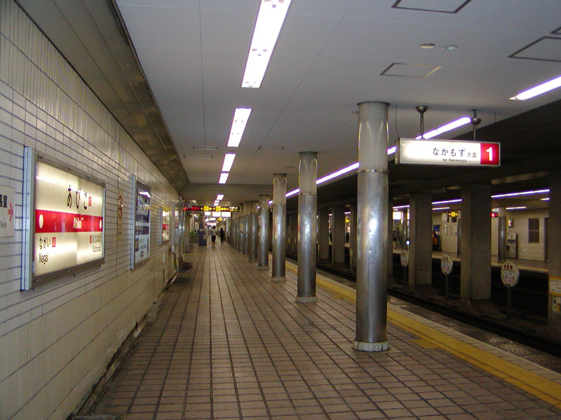 大阪市営地下鉄御堂筋線 あびこ駅 ホーム